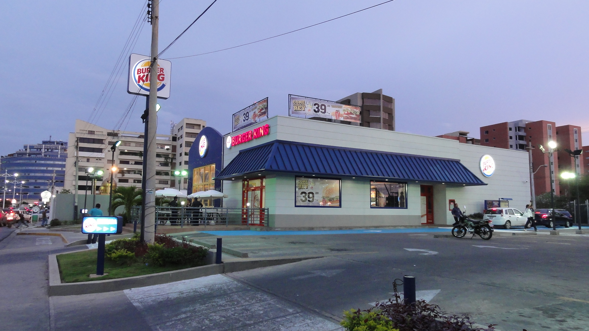 Lechería, Puerto la Cruz Venezuela